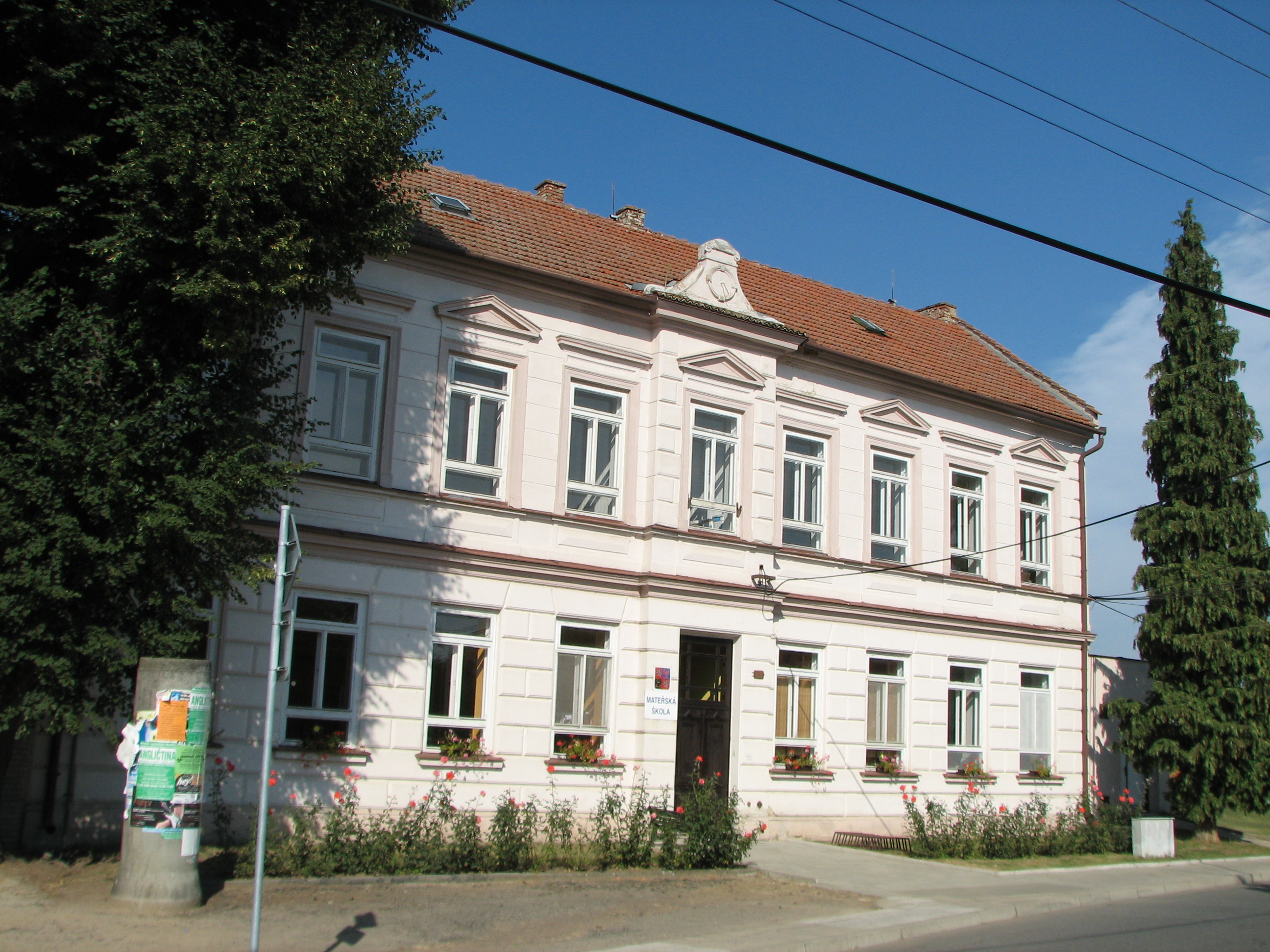 Česky: Skoronice - mateřská škola